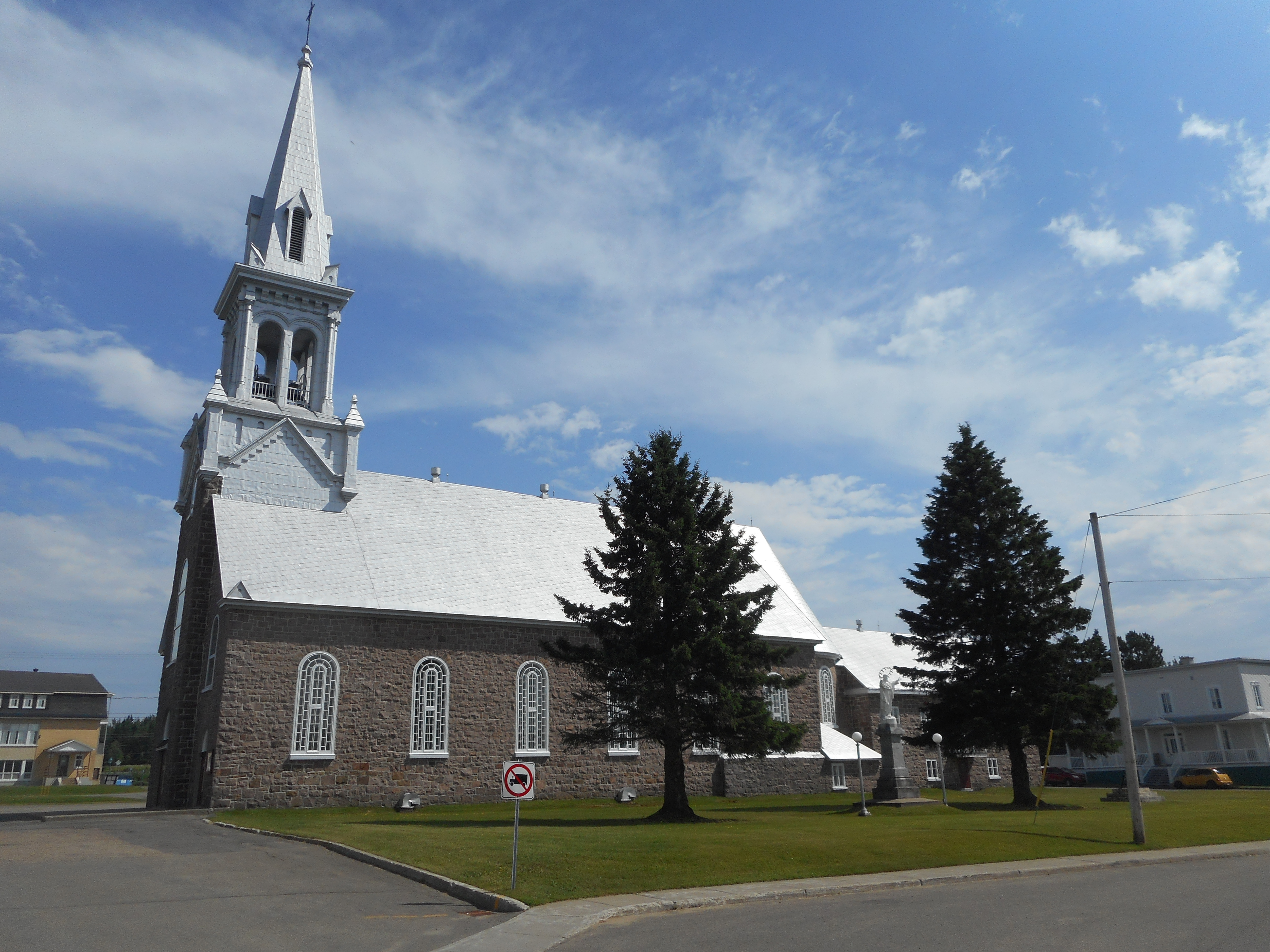 Église de Saint-Tite, 271, avenue Royale, Saint-Tite-des-Caps, Québec